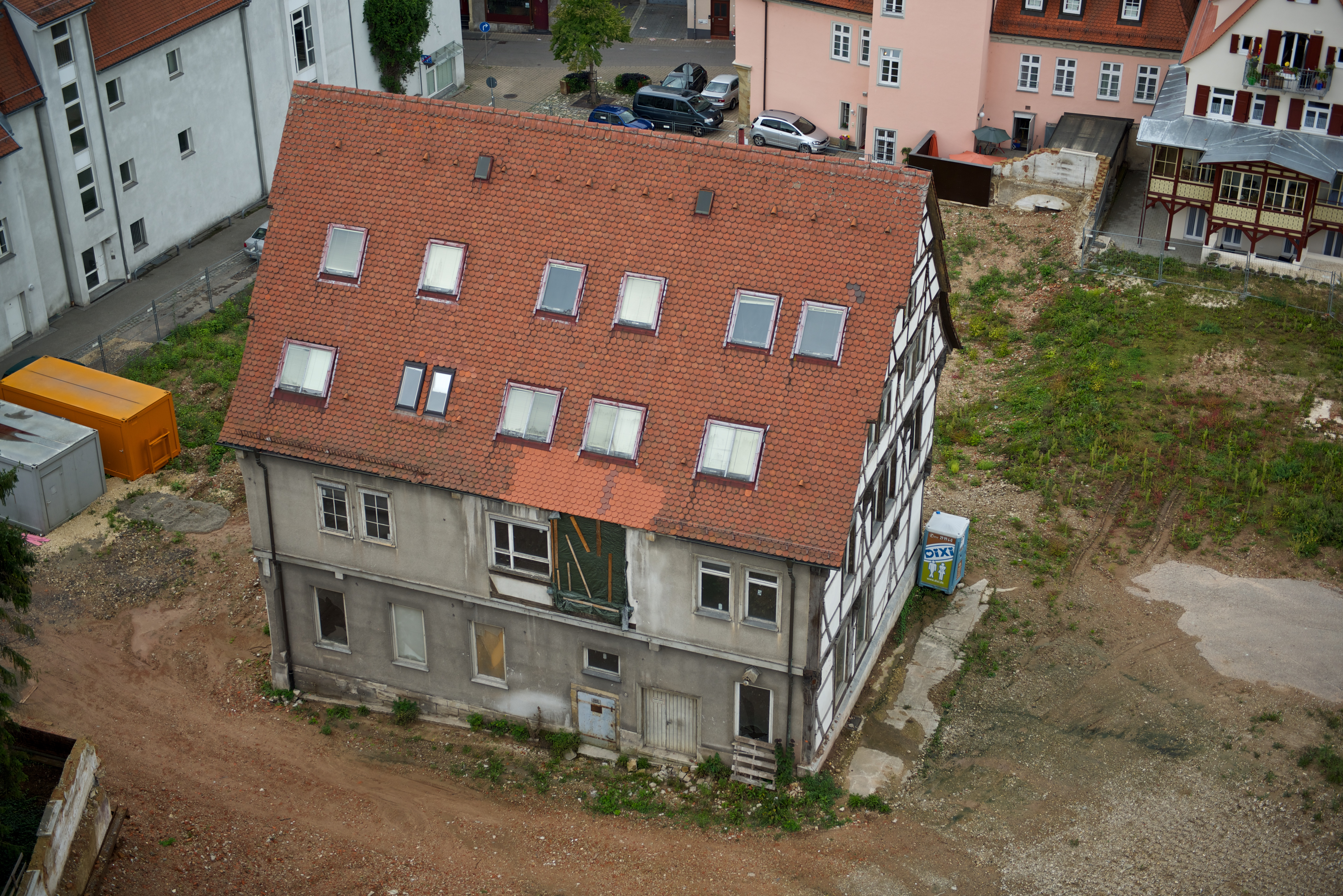 Rechbergsche Scheuer vom Königsturm gesehen